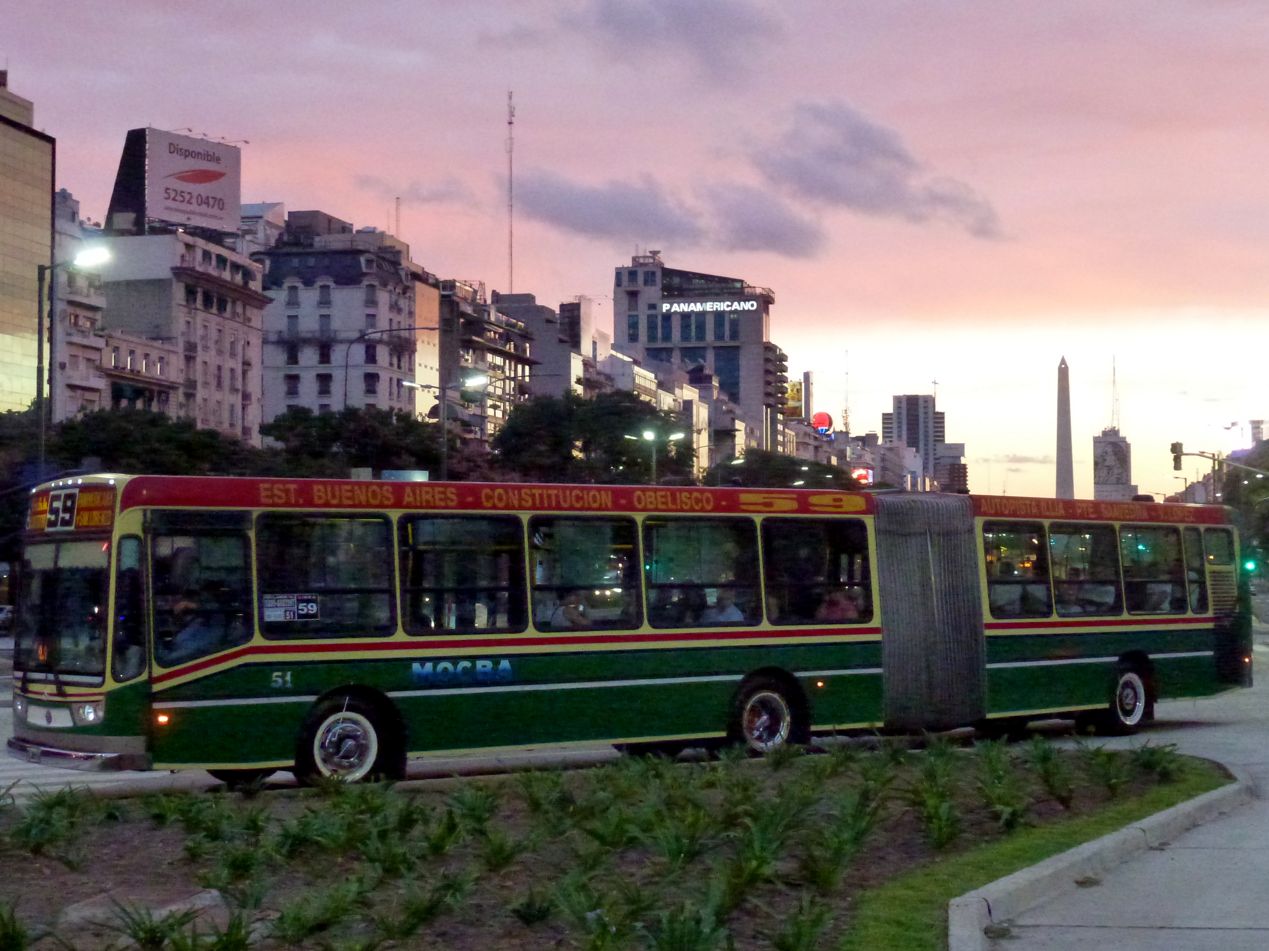 Colectivo con fuelle articulado de la línea 59 de Buenos Aires.